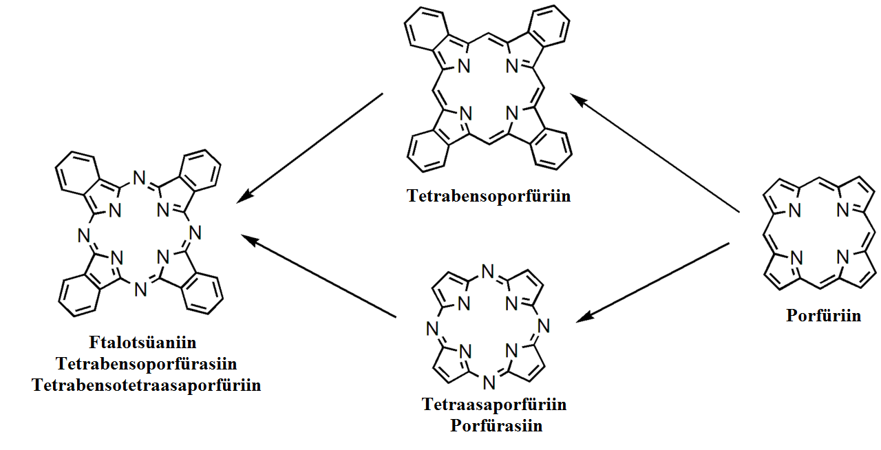 Porfüriinid ja ftalotsüaniin